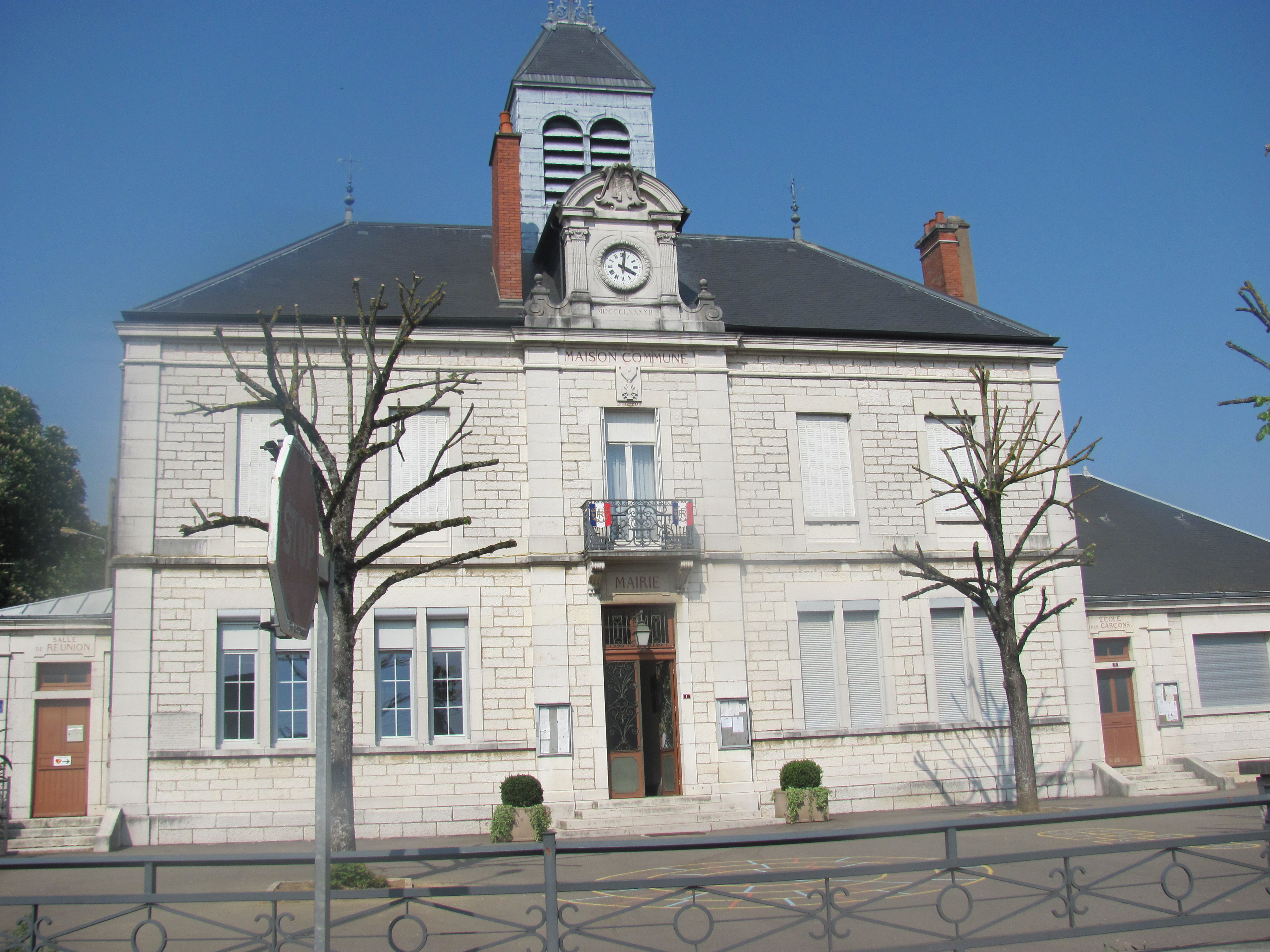 Mairie de Comblanchien